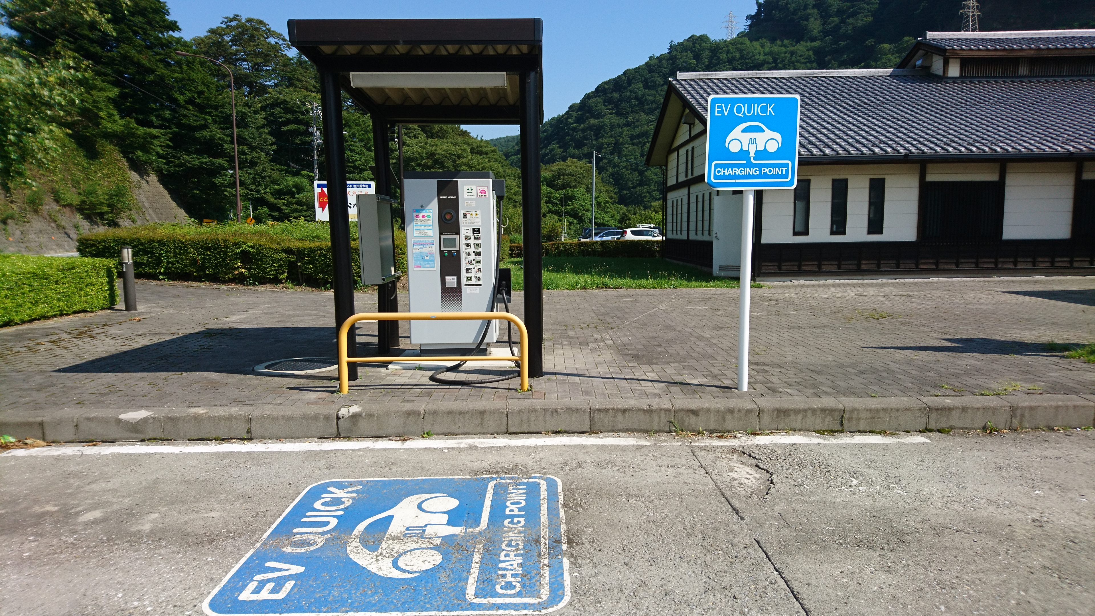 道の駅「信州蔦木宿」にあるEV車の充電設備